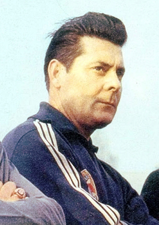 Dušan Nenković